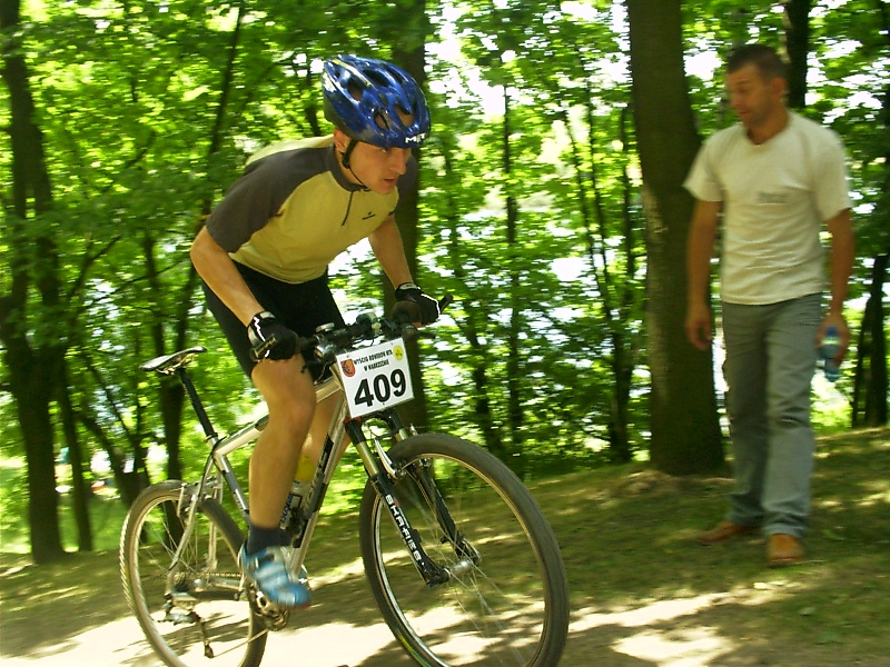 Zdjęcie z zawodów cross-country w Wąbrzeźnie (kuj.-pomorskie) 2005-07-10, na zdjęciu Bogumił Bieliński - Klub Uczelniany AZS ATR w Bydgoszczy